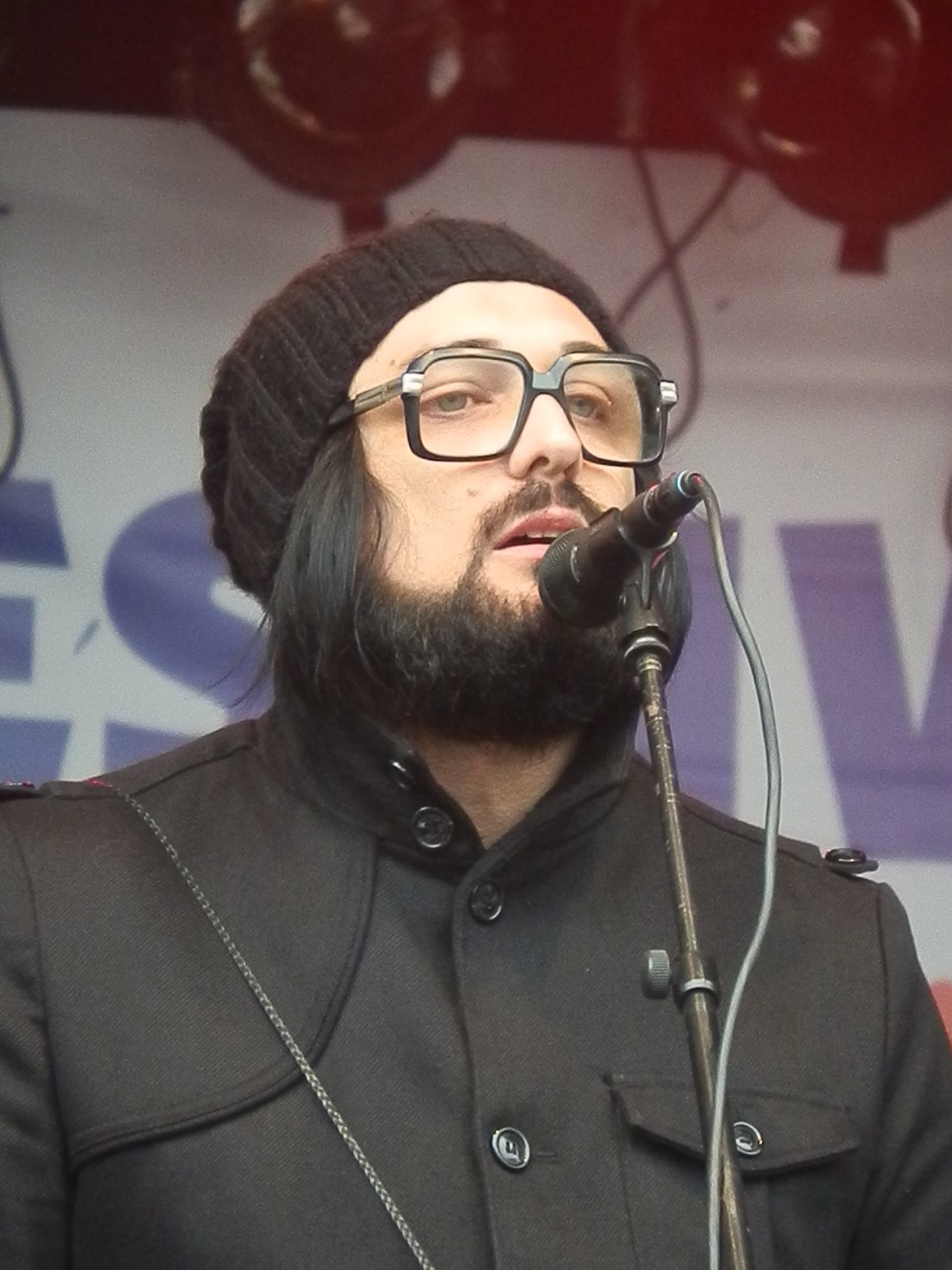 Blaudzun op het bevrijdingsfestival in Utrecht (5 mei 2012)